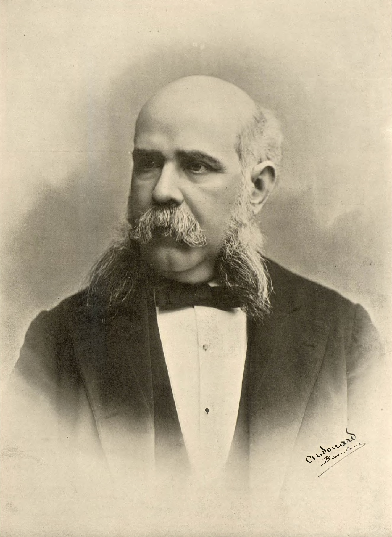 Retrato de Francisco de Paula Rius y Taulet, fotografía de Pablo Audouard recogida en la revista española La Esfera.